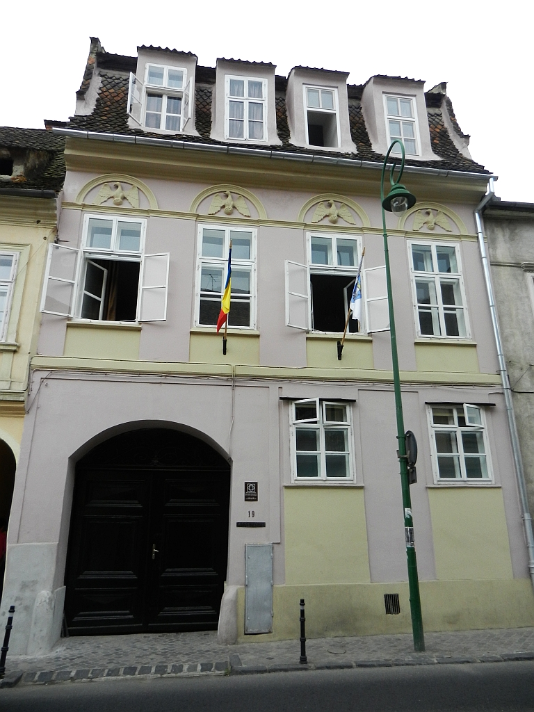 Casă monument istoric